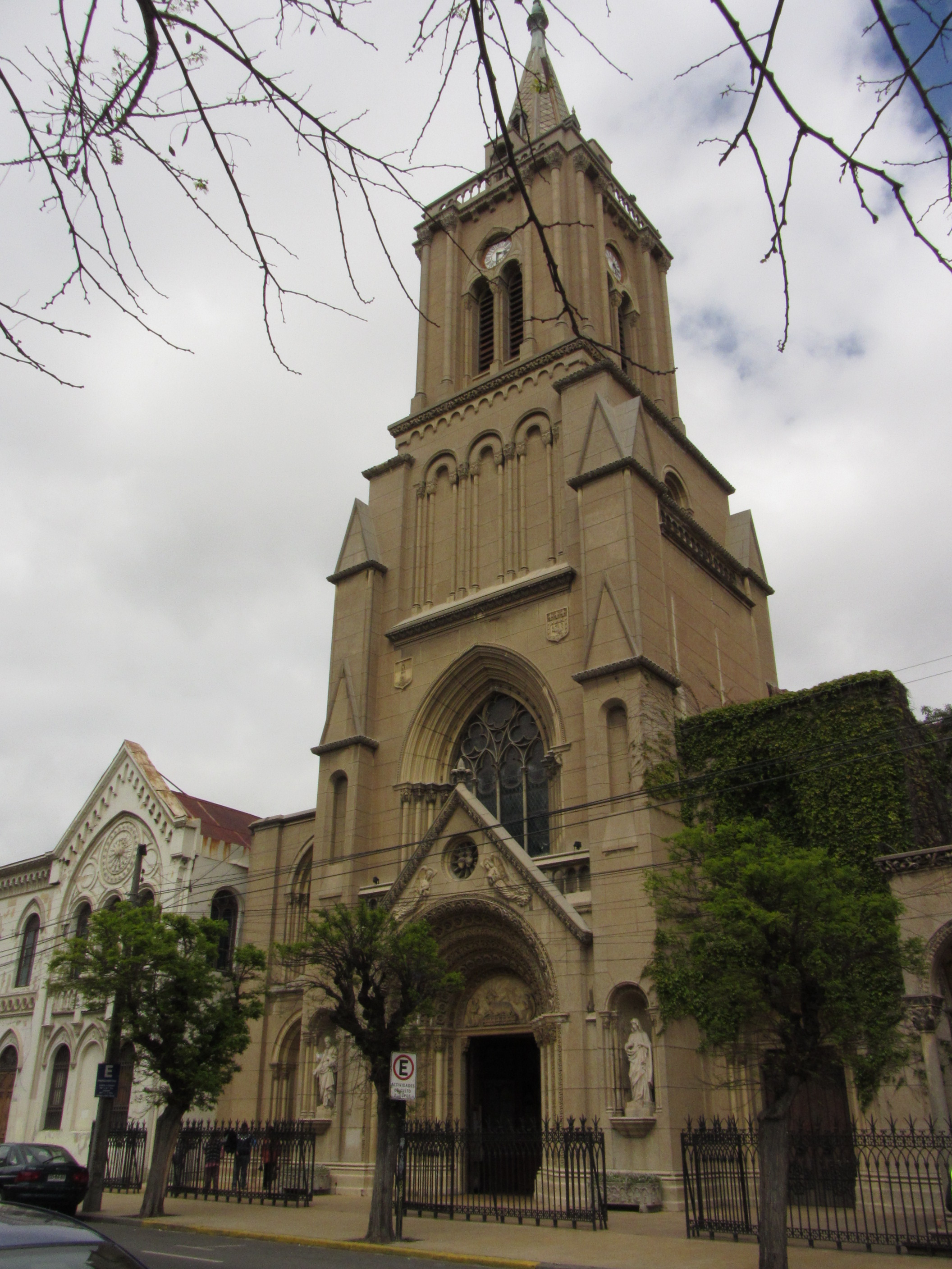 Iglesia de los Sagrados Corazones This is a photo of a national monument in Chile: 1839